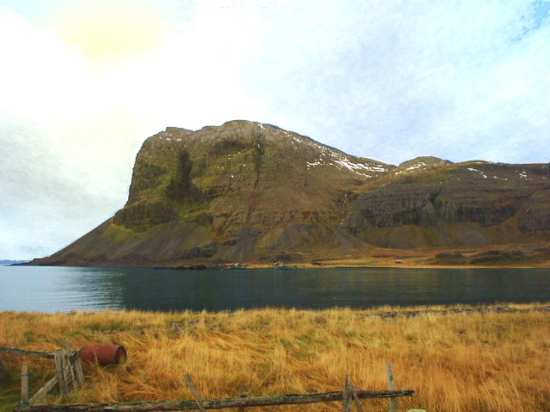 Kaldbakshorn í Kaldbaksvík.